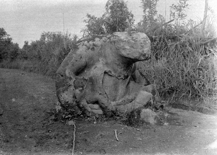 Negatief. Groot stenen zittend beeld aan een weg in Zuid-Sumatra